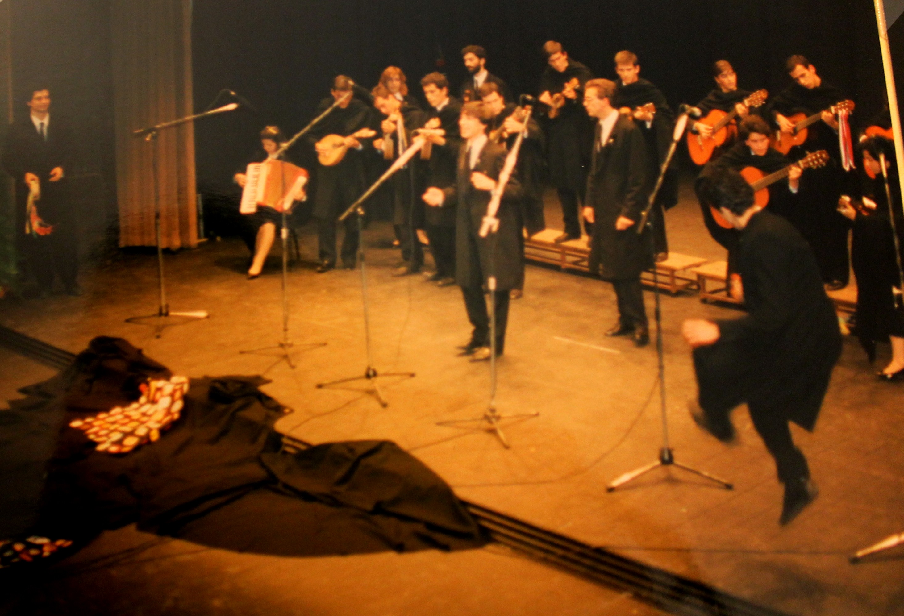 Actuação da Tuna Universitária do Porto no I FITU, 16.10.87, Teatro Carlos Alberto